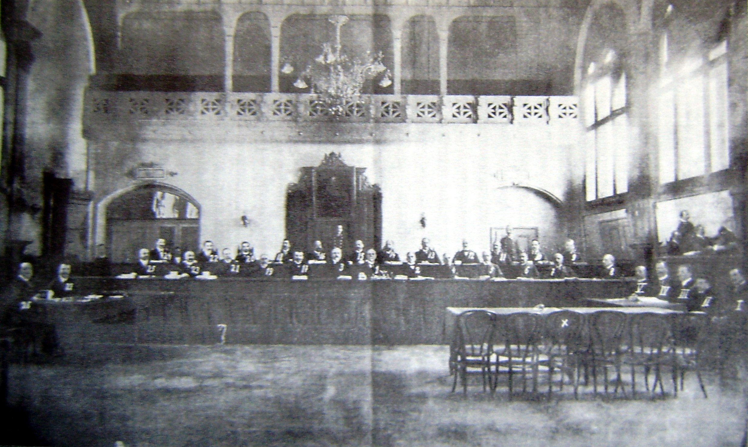 Заседание на Втория държавен съд